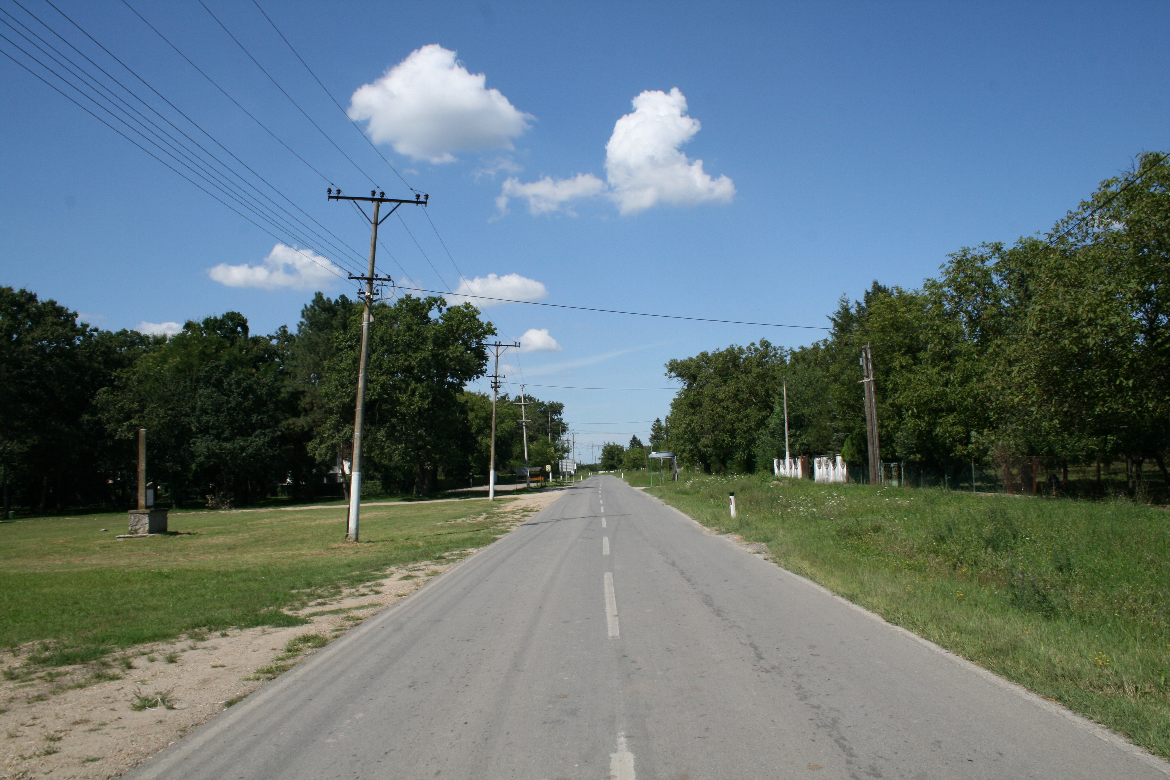 Пут за Прогар